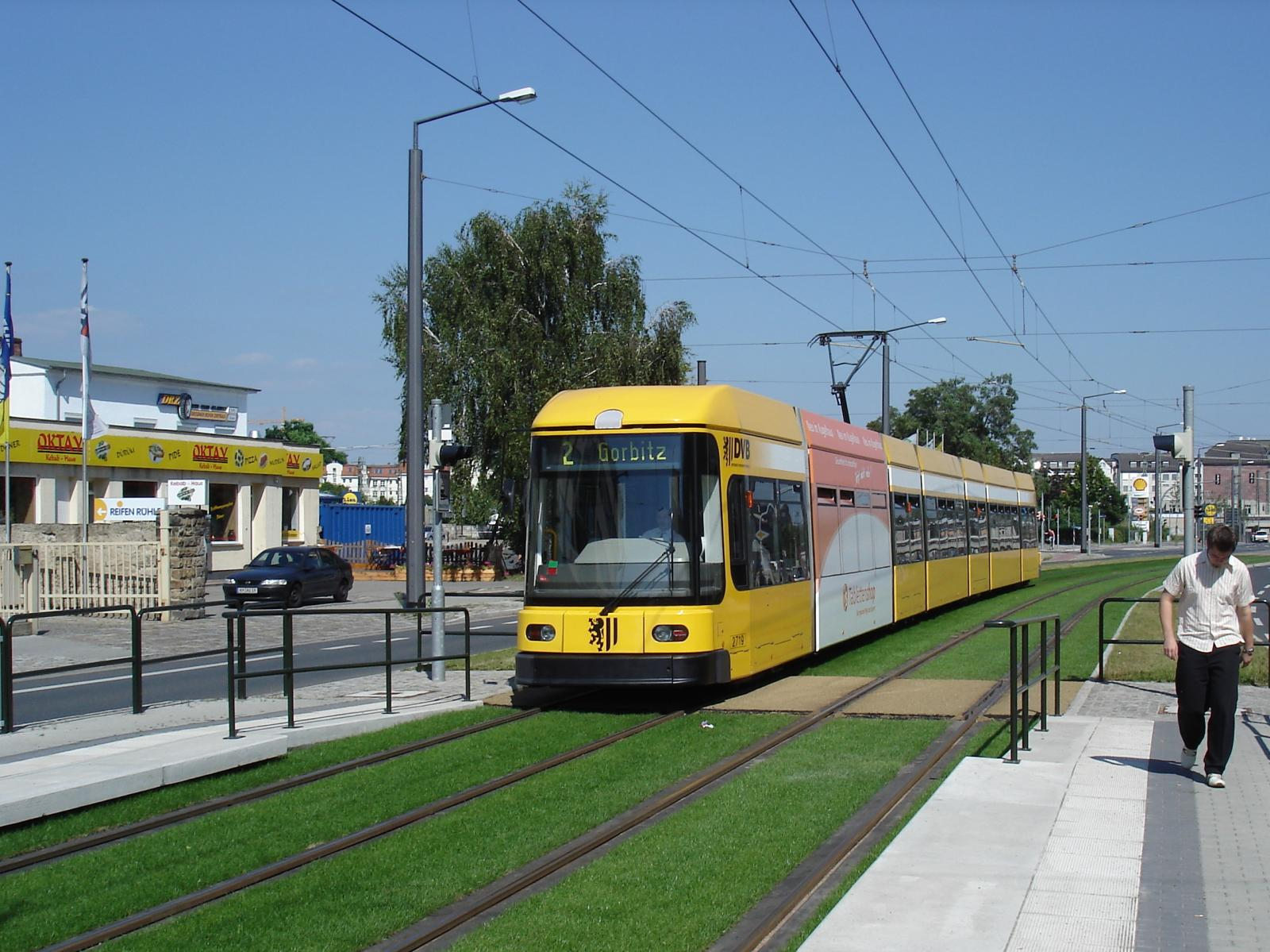 2719 erreicht die Haltestelle Cottaer Straße